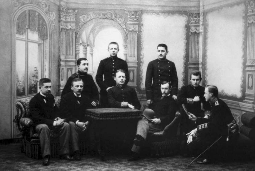 Круг молодых друзей П. И. Чайковского (четвёртый слева за столом - Владимир Давыдов)